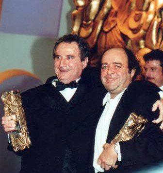 Daniel Prévost et Jacques Villeret à la cérémonie des César.